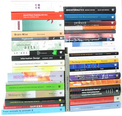 Libros de la editorial MIT Press Tomada con una PowerShot A60 y modificada con The Gimp para la Wikipedia. Categoría:Informática (imagen) Image:MITPressBooks.jpg